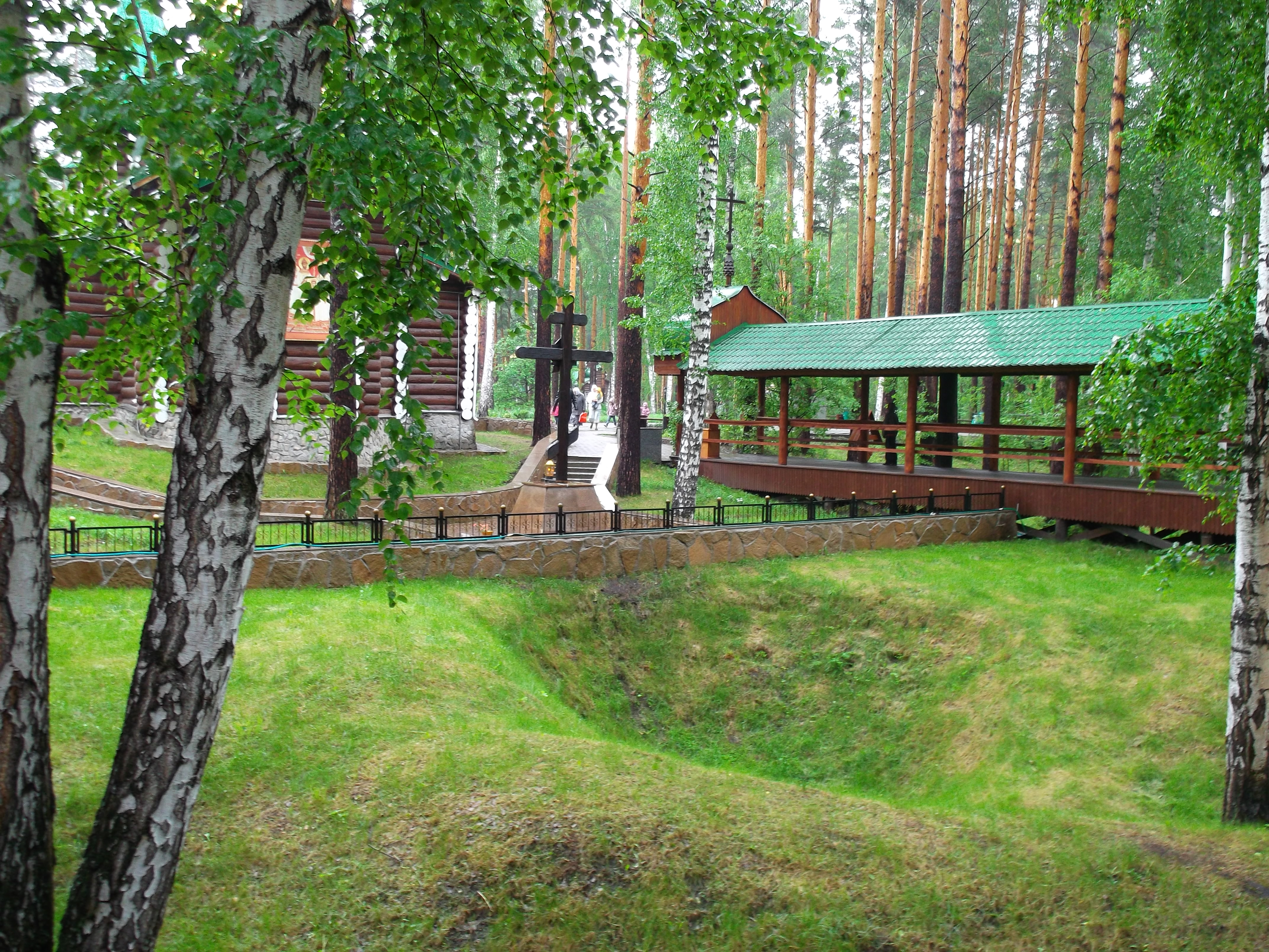 Ганина яма